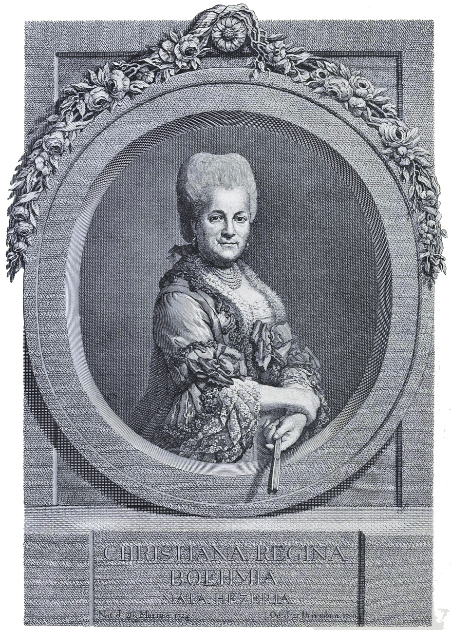 Christiana Regina Hetzer, verehelichte Neuhaus, Richter und Böhme. Erste Hausherrin der Gohliser Schlösschens in Leipzig